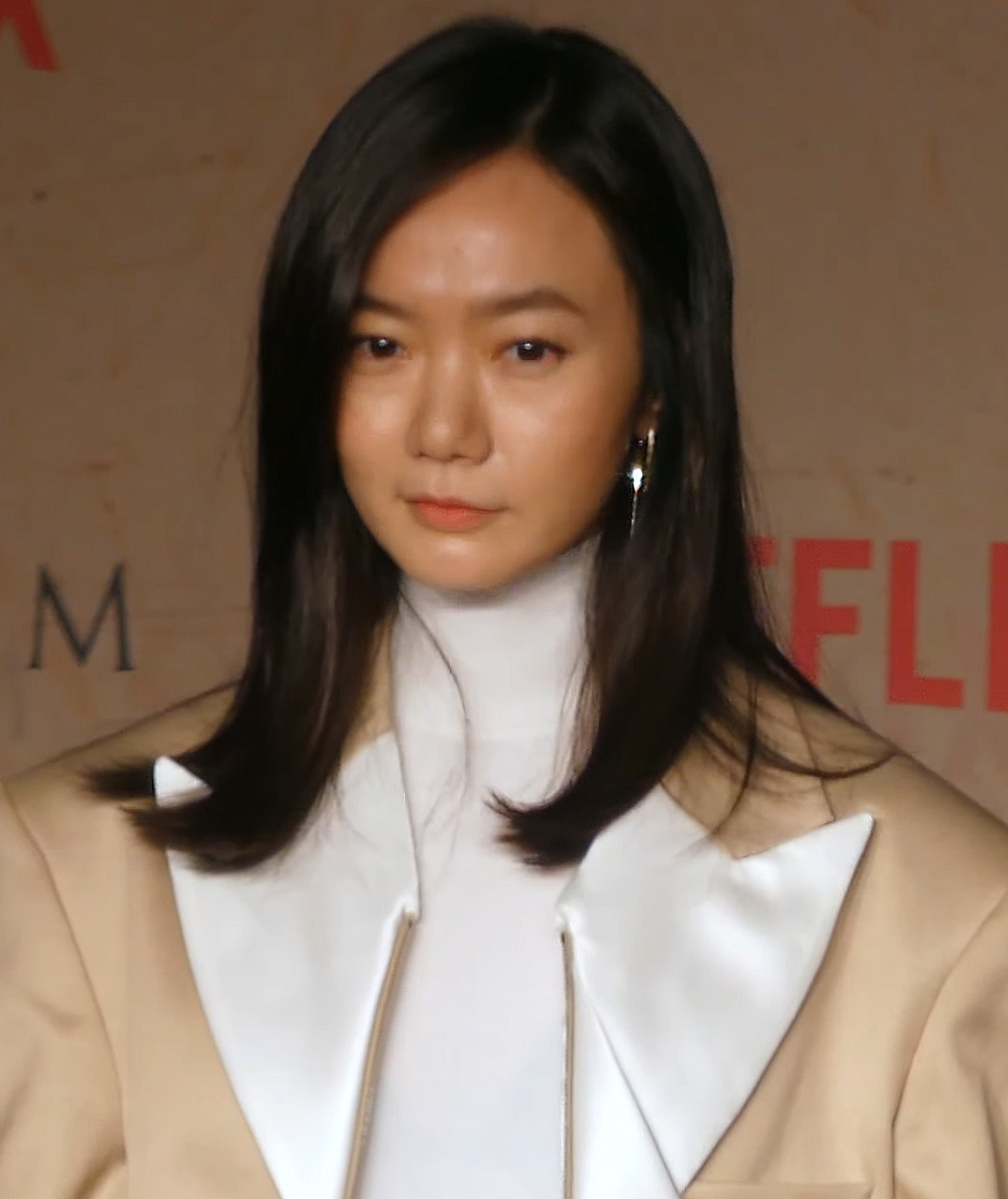 裴斗娜於2019年1月21日出席在首爾的Netflix《李屍朝鮮》記者會。